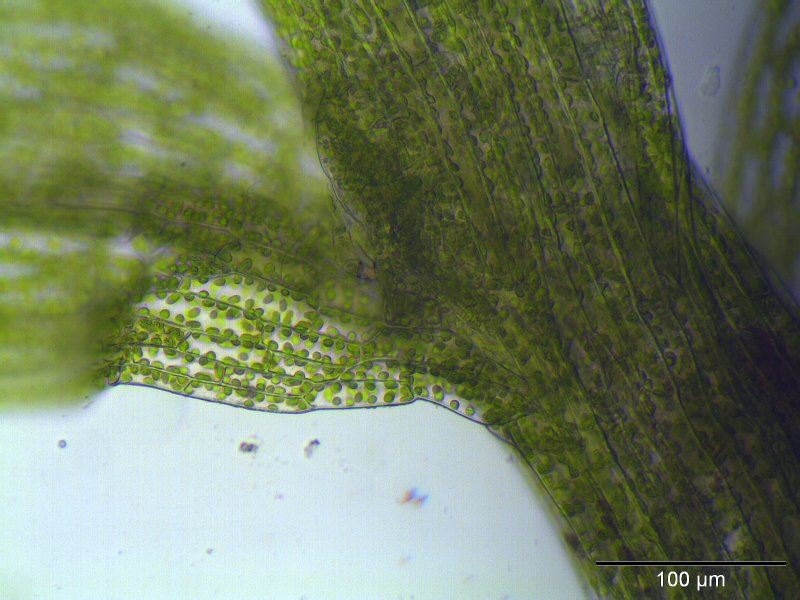 Kreiselfrüchtiges Birnmoos (Bryum turbinatum), herablaufende Blattbasis, 250x vergrößert